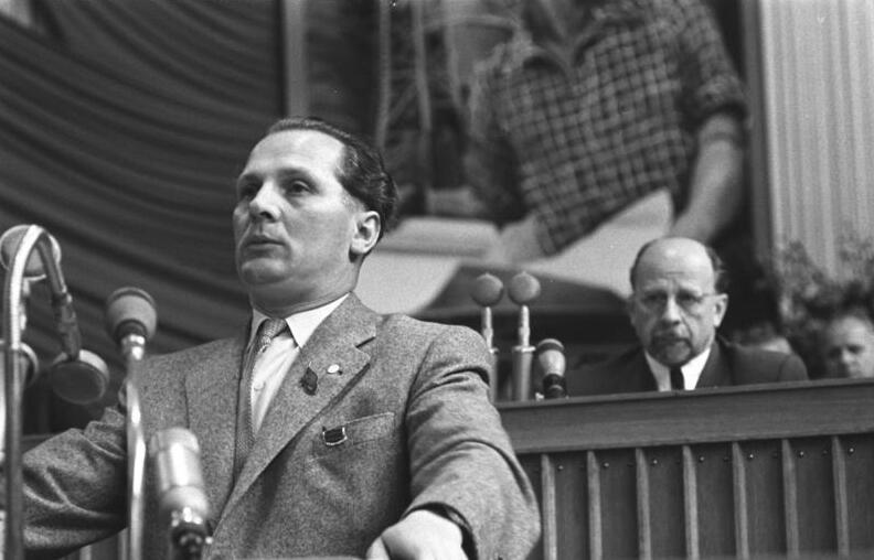 Zentralbild- Zühlsdorf 13.7.1958 V. Parteitag der SED vom 10. bis 16.7.1958 in der Werner-Seelenbinder-Halle, Berlin 5.Tag: UBz: Über die Parteiarbeit in den bewaffneten Organen der Arbeiter- und Bauernmacht sprach der Kandidat des Politbüros Erich Honecker. [dahinter Walter Ulbricht] (Zühlsdorf)